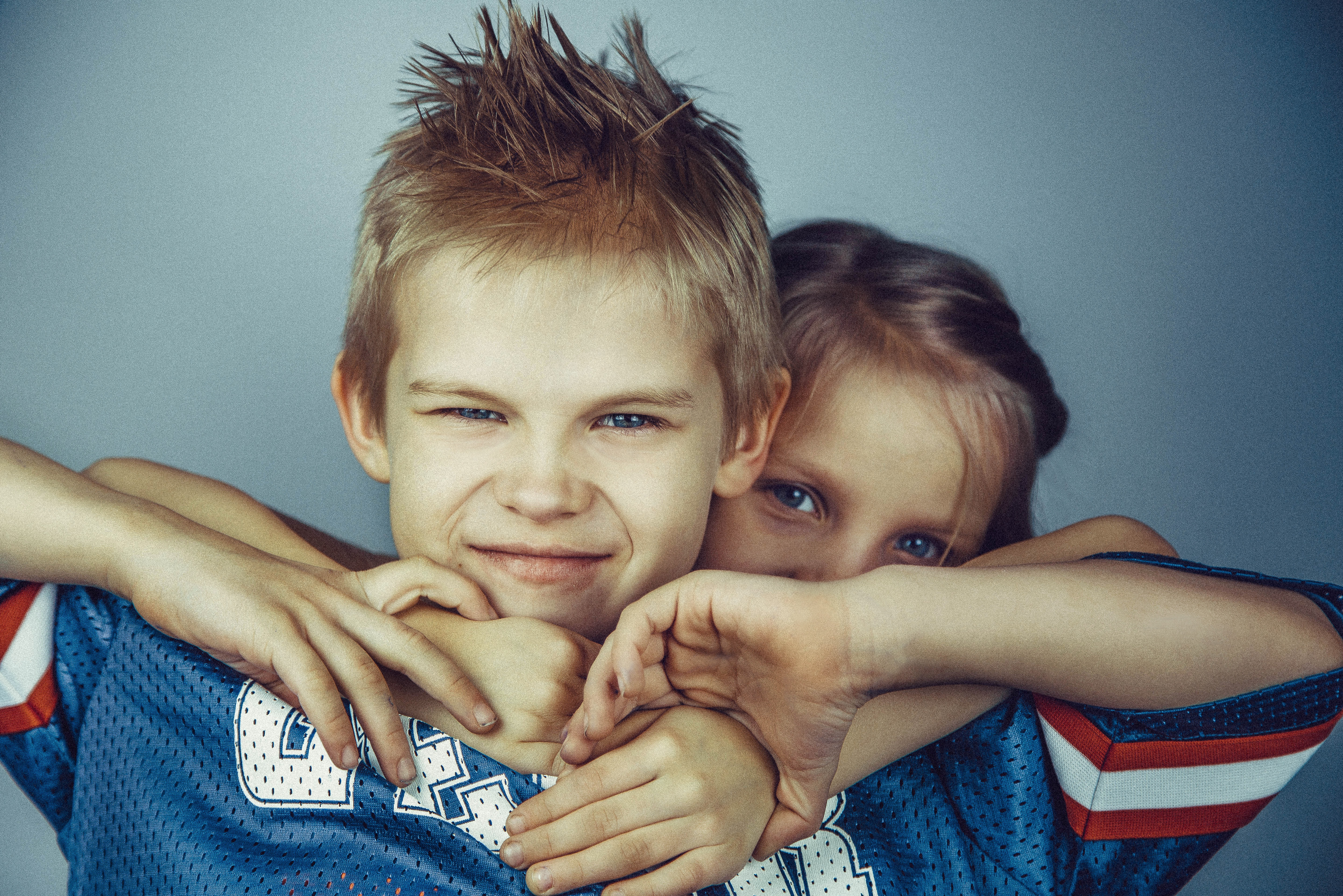 Ségrégation séxuée